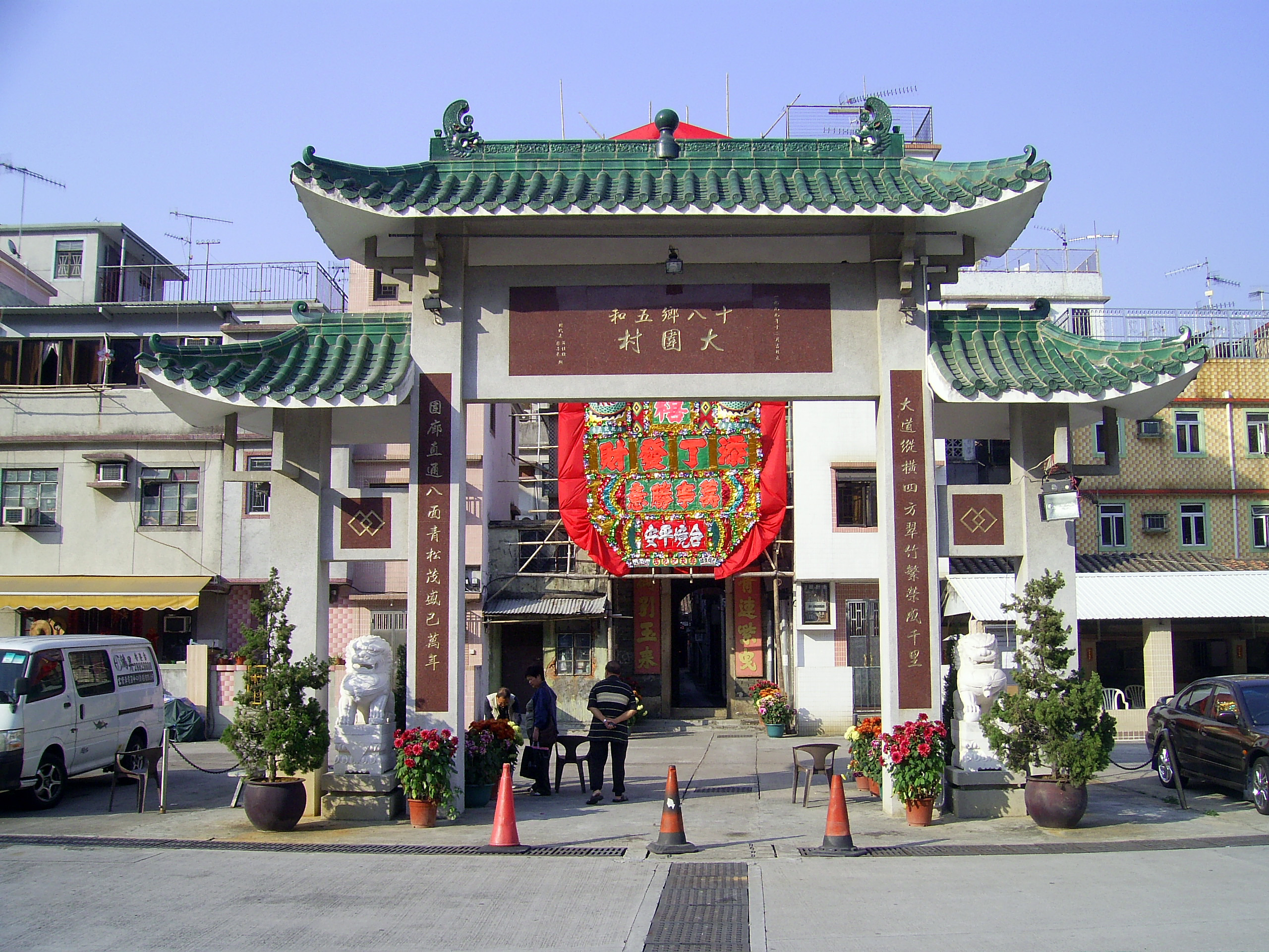 中文（香港）: 大圍村牌樓